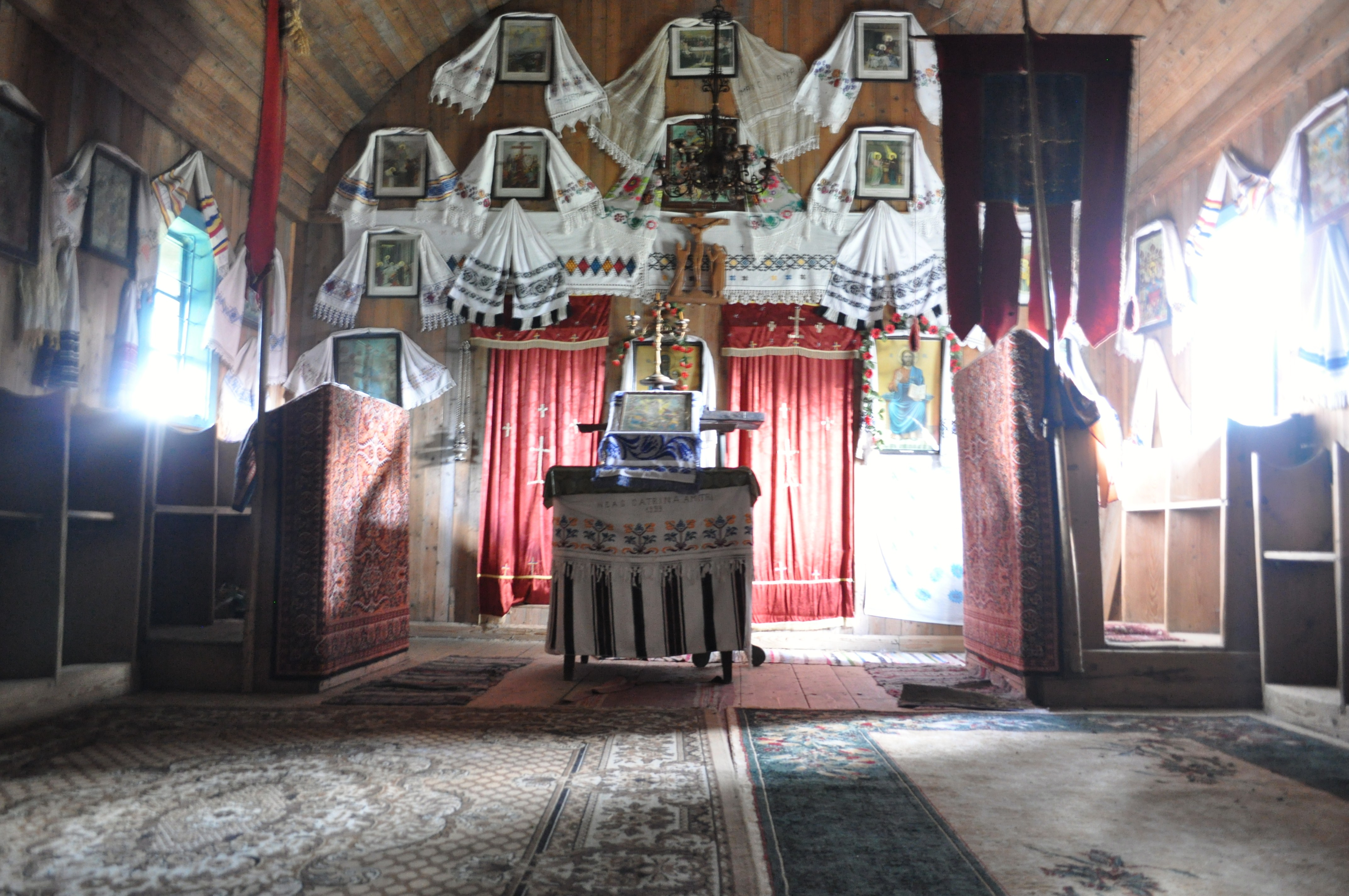 Biserica de lemn din Beliș, județul Cluj